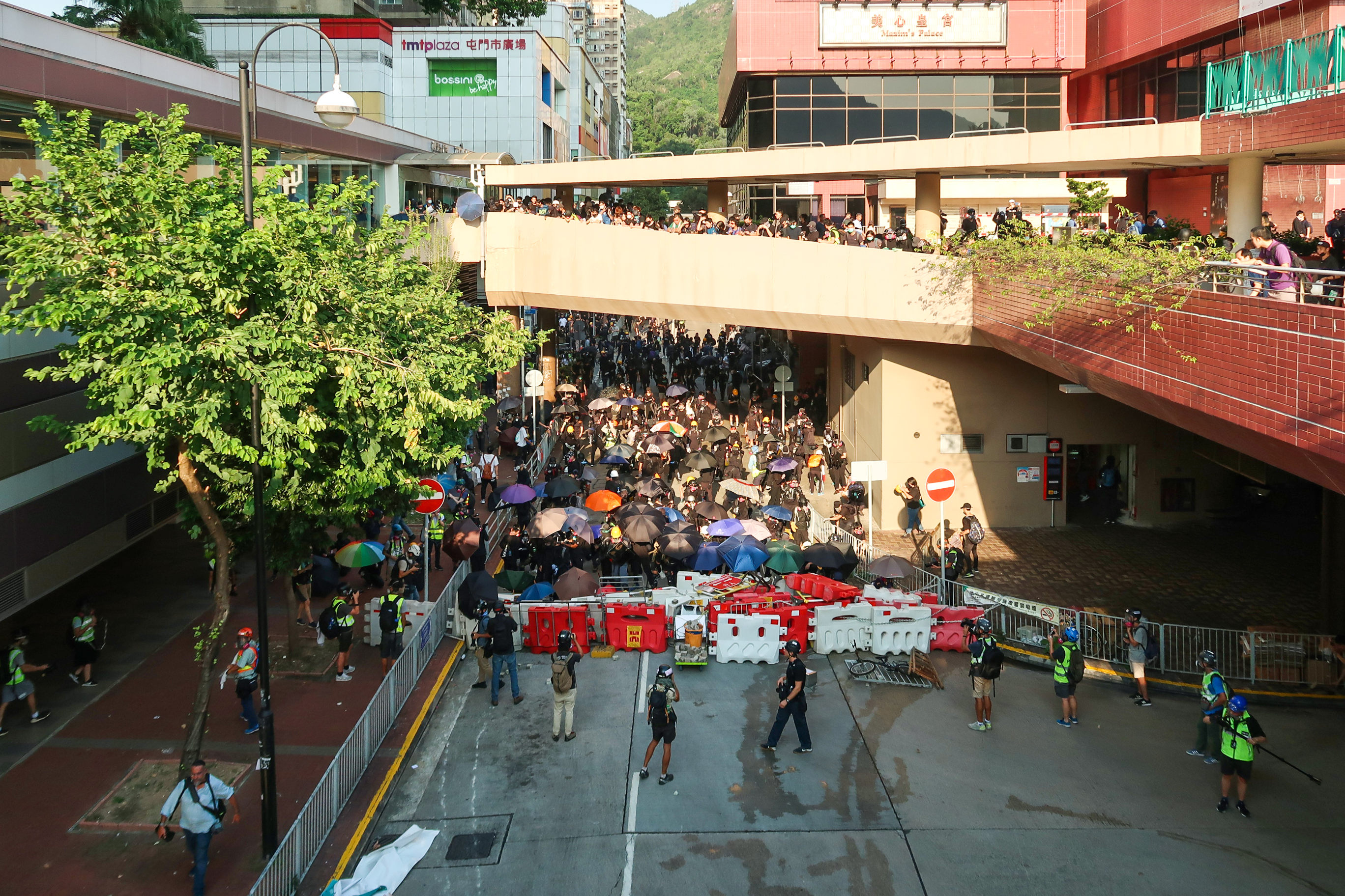 Tuen Wui Street protesters